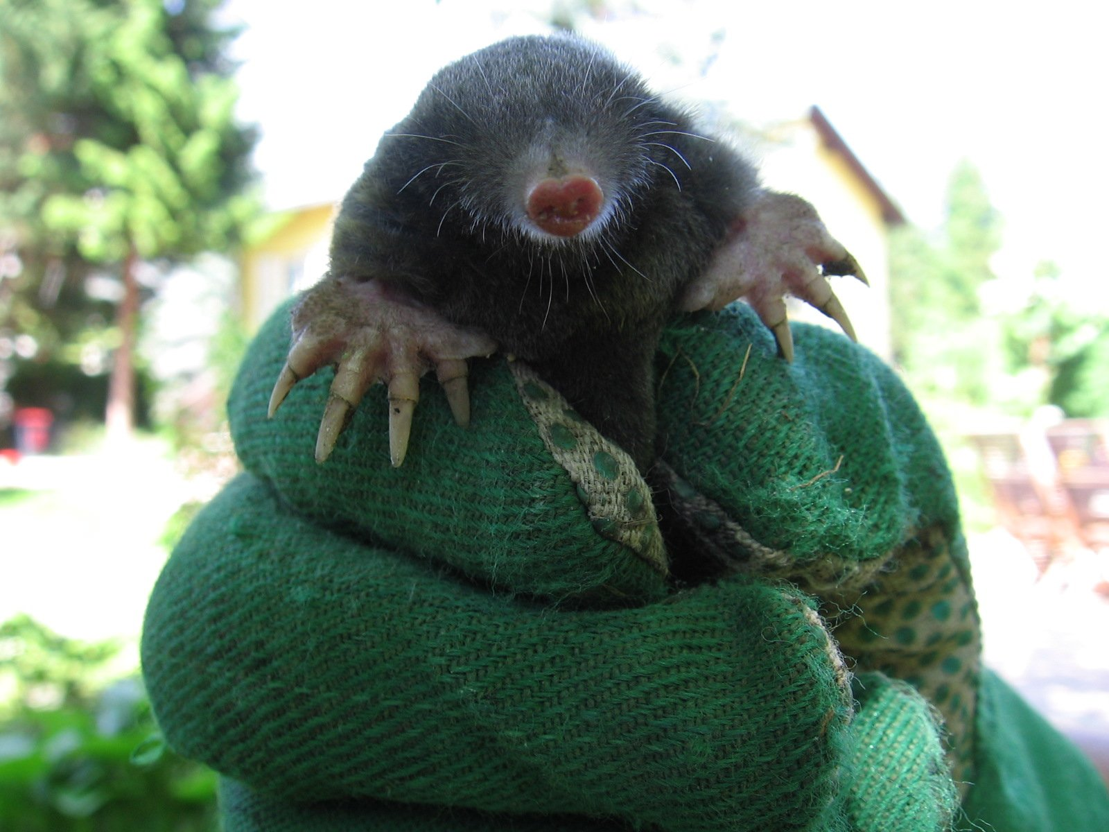 gefangener Maulwurf (lebendig)